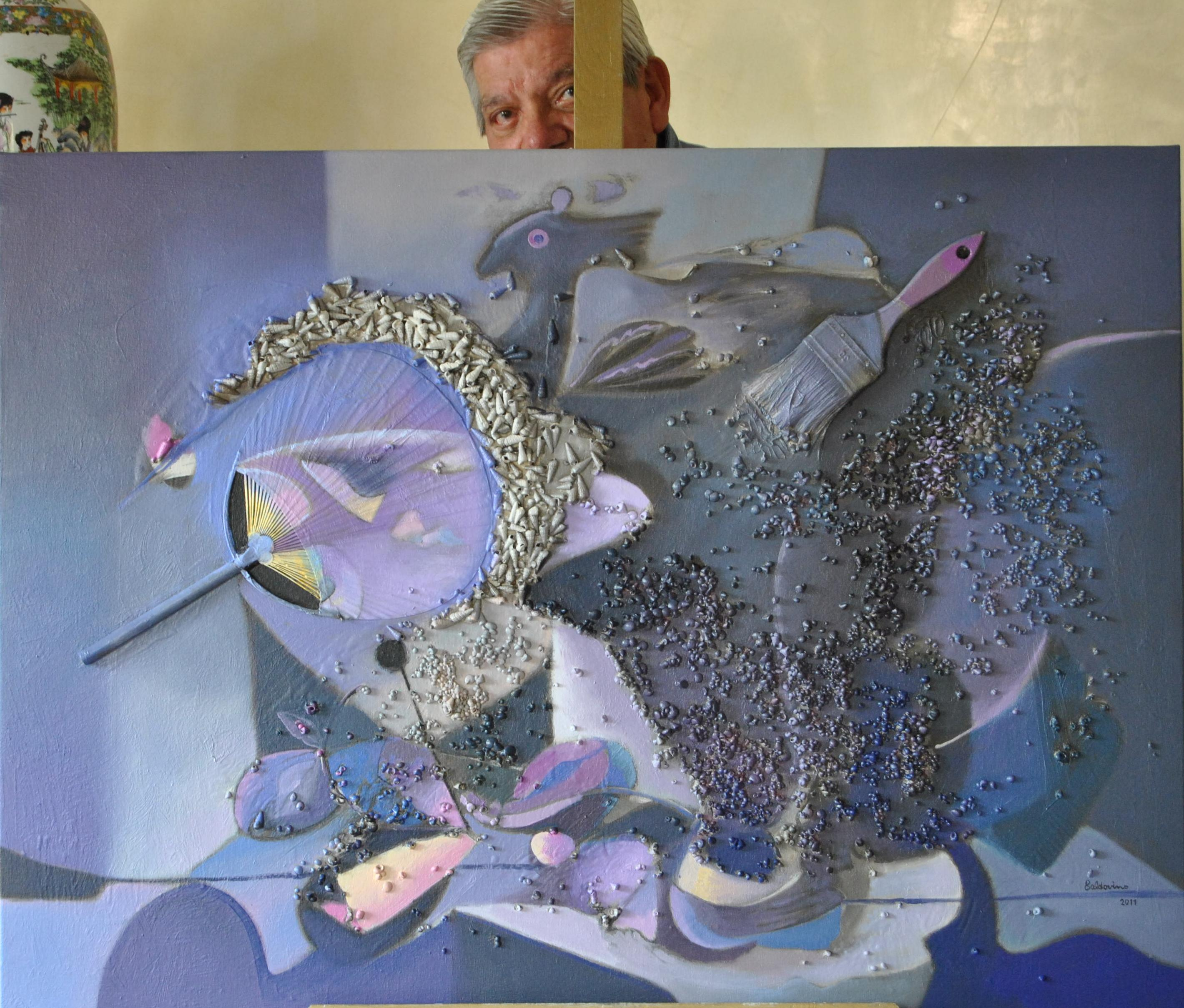 Óleo sobre tela. 100x81